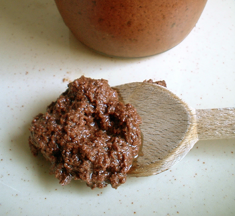 hölzerner Kochlöffel mit Tapenade.